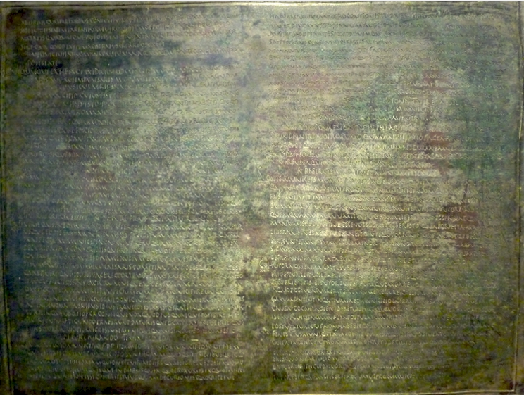 Bronzetafel Lex Salpensana mit flavischem Stadtrecht (Kapitel 21 bis 29)